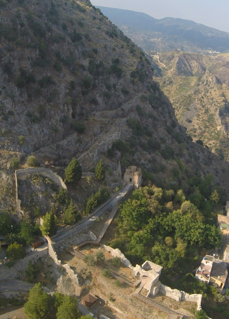 Cattolica di Stilo dall'alto 2016